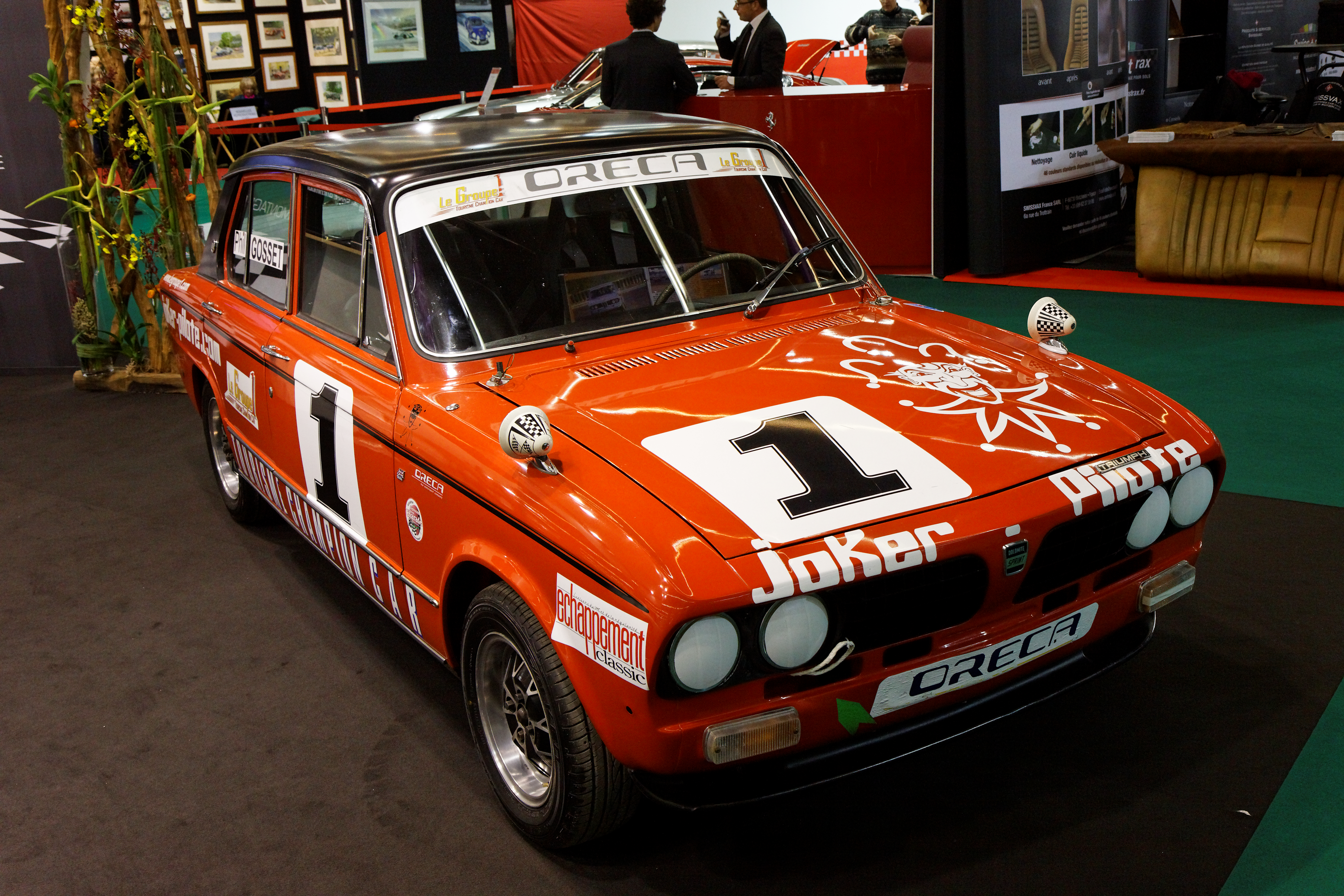 Photographie prise lors du salon rétromobile 2011 à Paris, porte de Versailles.